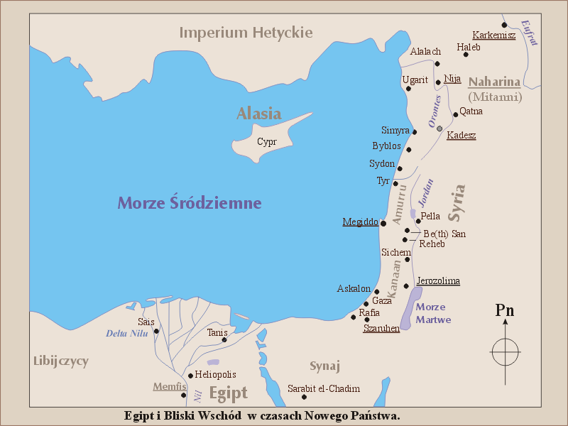 Schematyczna mapa Bliskiego Wschodu w czasach początków Nowego Państwa, w okresie panowania Tutmozydów.